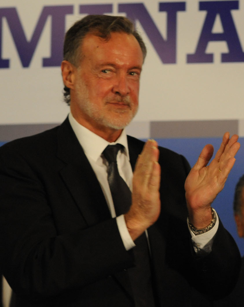 La presidenta Cristina Fernández encabezó esta noche el acto de inauguración de la Terminal B de Ezeiza, que demandó una inversión de 570 millones de pesos. Previamente, inauguró el Centro de Formación de Pilotos de Aerolíneas Argentinas, con una inversión de 125 millones de pesos.